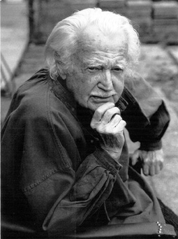 Portrait Rudolf Warnecke